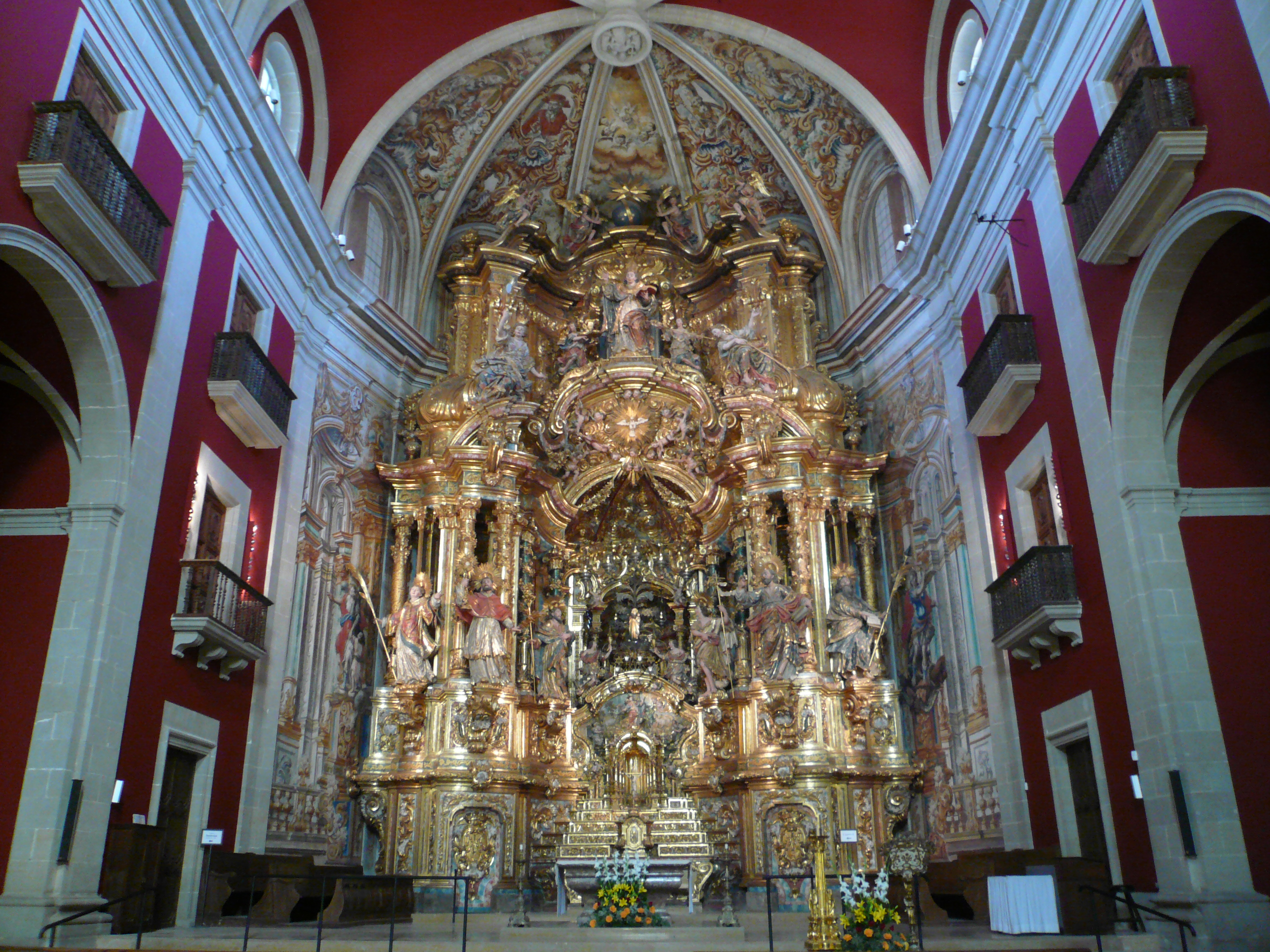 Altar del Santuari